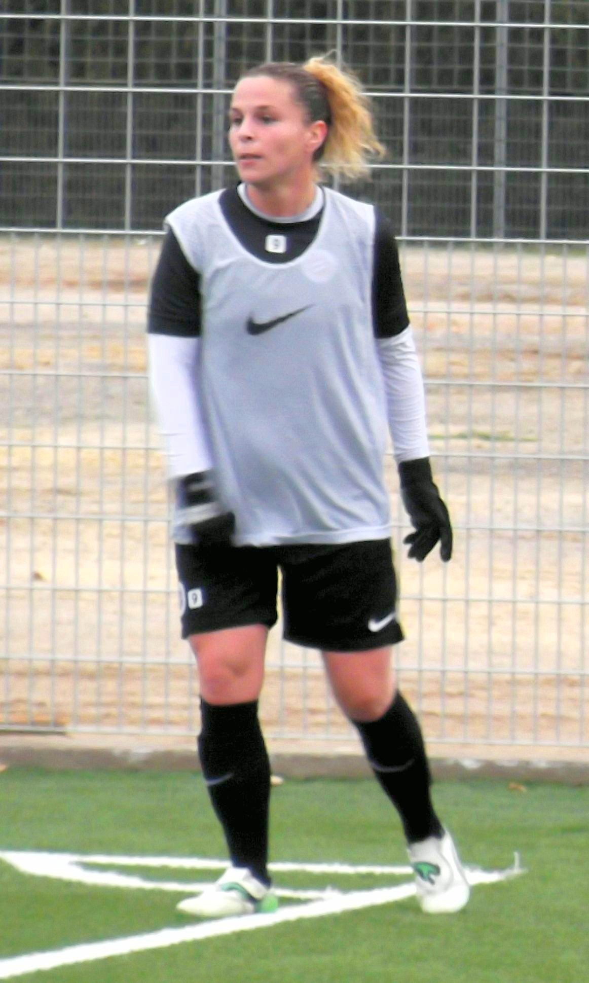 Élodie Ramos, janvier 2014.